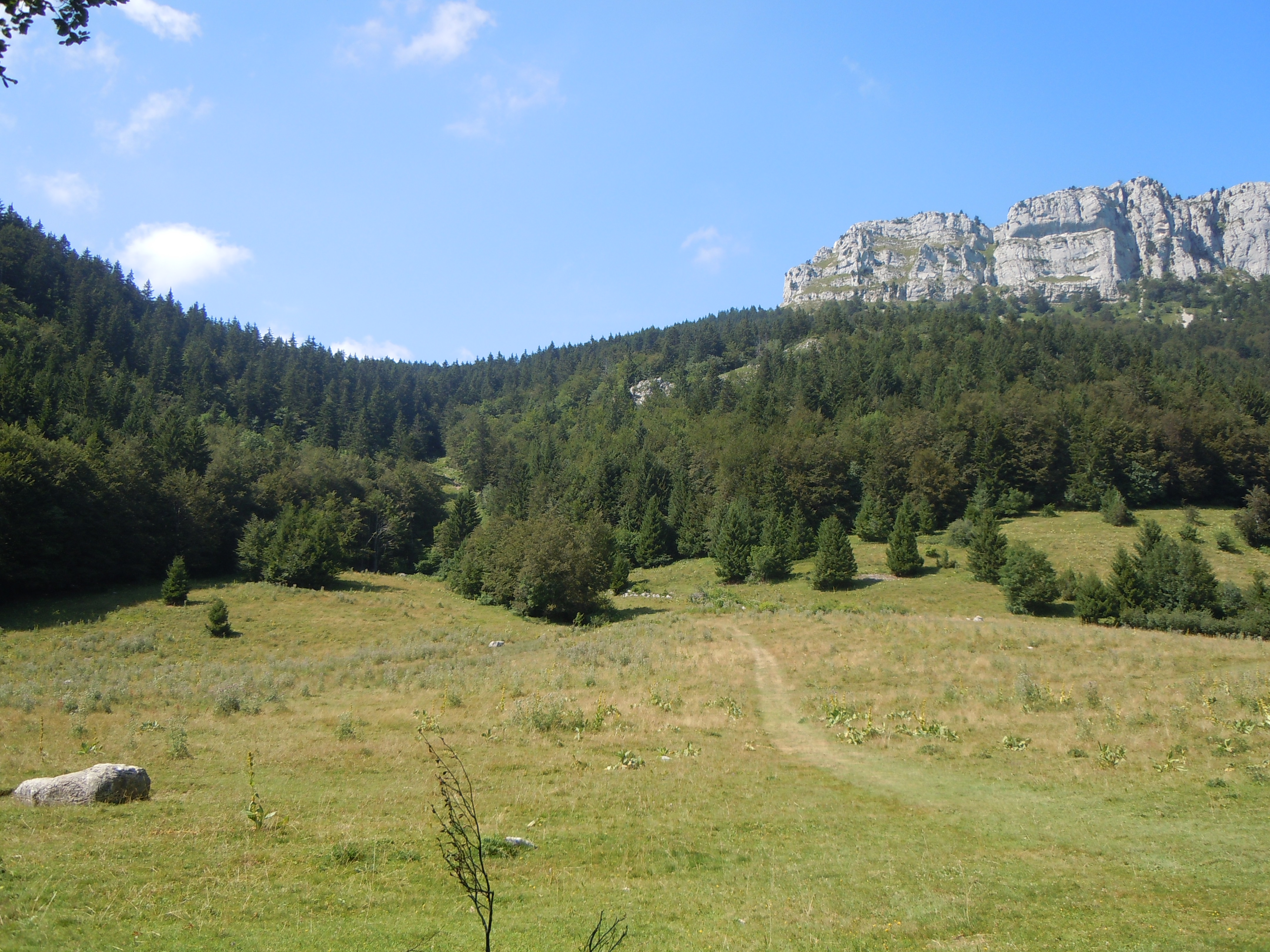 Col du Grapillon - Mont Outheran